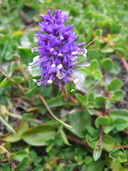 Veronica allionii, Piémont italien sur le tour de la tête des Toillies au départ de Saint Véran